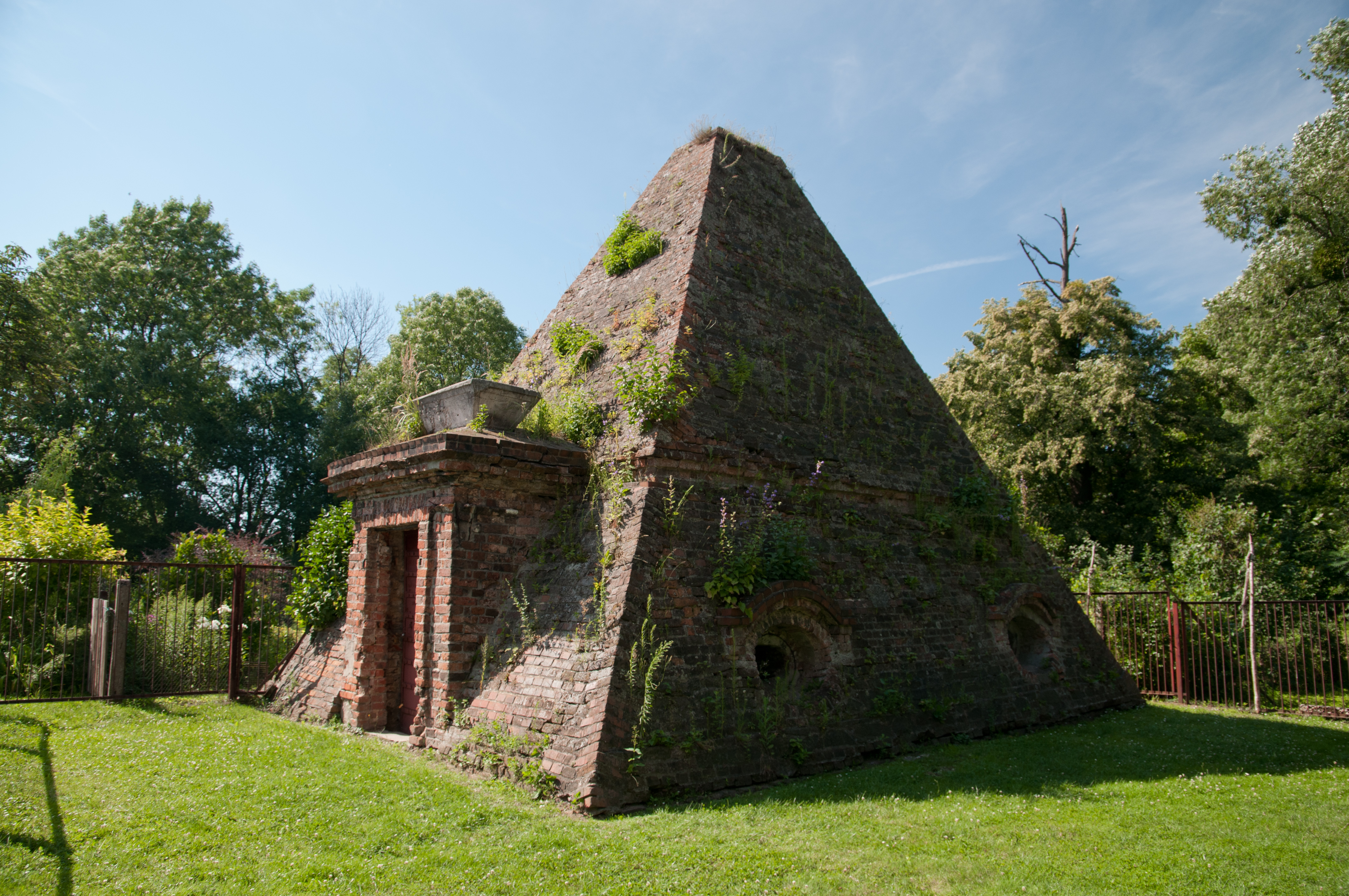 Rożnów - grobowiec „piramida” rodzin Eben i Mohring, obok kościoła filialnego, 1780 (zabytek nr A-25/2003 z 12.10.2003)